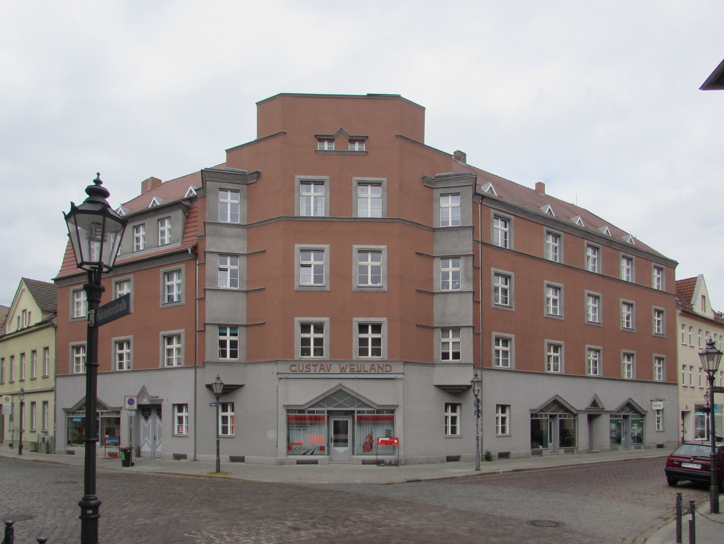 Denkmalgeschütztes Wohn- und Geschäftshaus Gustav Weyland mit der Adresse Parduin 1–2/Ecke Rathenower Straße 7 in Brandenburg an der Havel